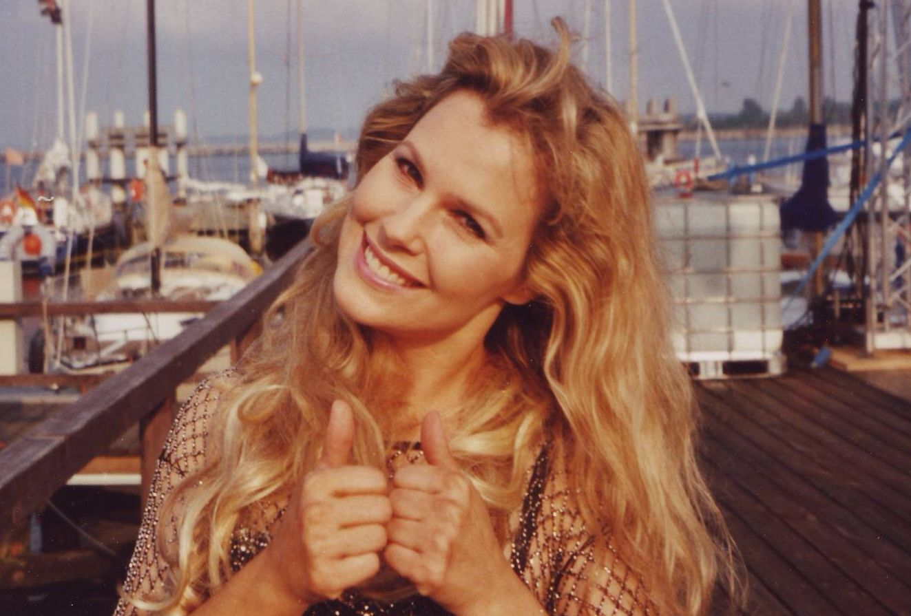 Lory in Warnemünde